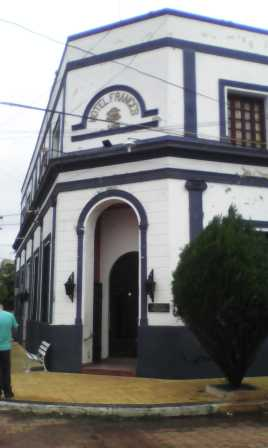 Vista del famoso Hotel Francés de la ciudad de Concepción, Paraguay. Mayo de 2017.